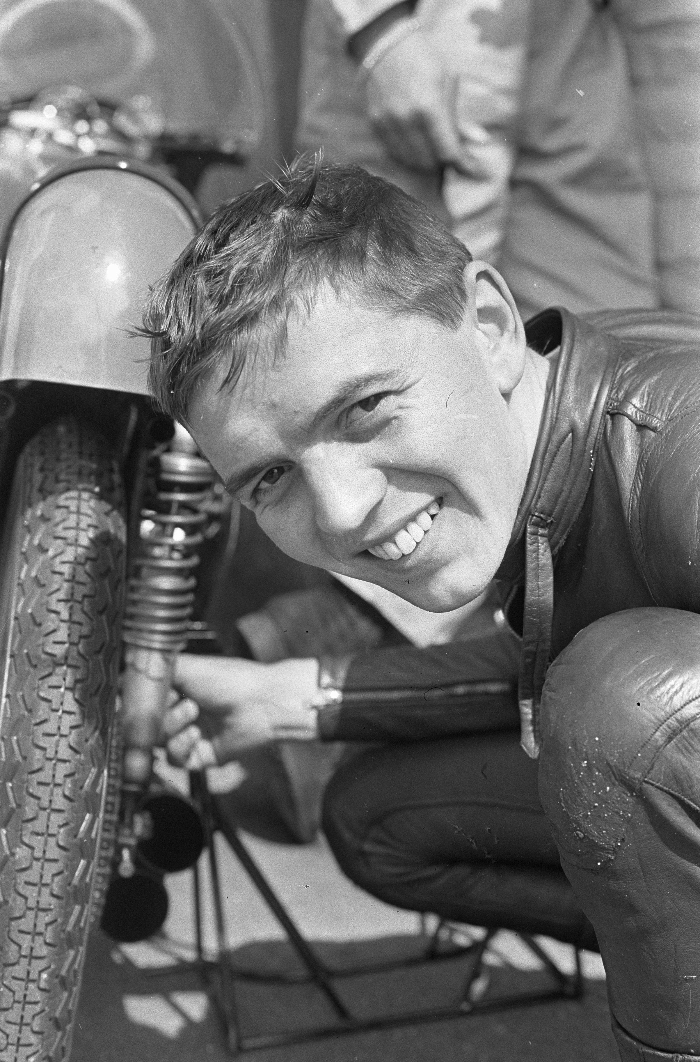 Collectie / Archief : Fotocollectie Anefo Reportage / Serie : TT Assen 1966 Beschrijving : TT te Assen, training, Ralph Bryans bij zijn motor (Honda, 50cc) Datum : 22 juni 1966 Locatie : Assen Trefwoorden : coureurs, motorsport, portretten, trainingen Persoonsnaam : Bryans, Ralph Fotograaf : Kroon, Ron / Anefo Auteursrechthebbende : Nationaal Archief Materiaalsoort : Negatief (zwart/wit) Nummer archiefinventaris : bekijk toegang 2.24.01.05 Bestanddeelnummer : 919-2786